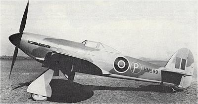 Hawker Tempest Mk I (HM599)